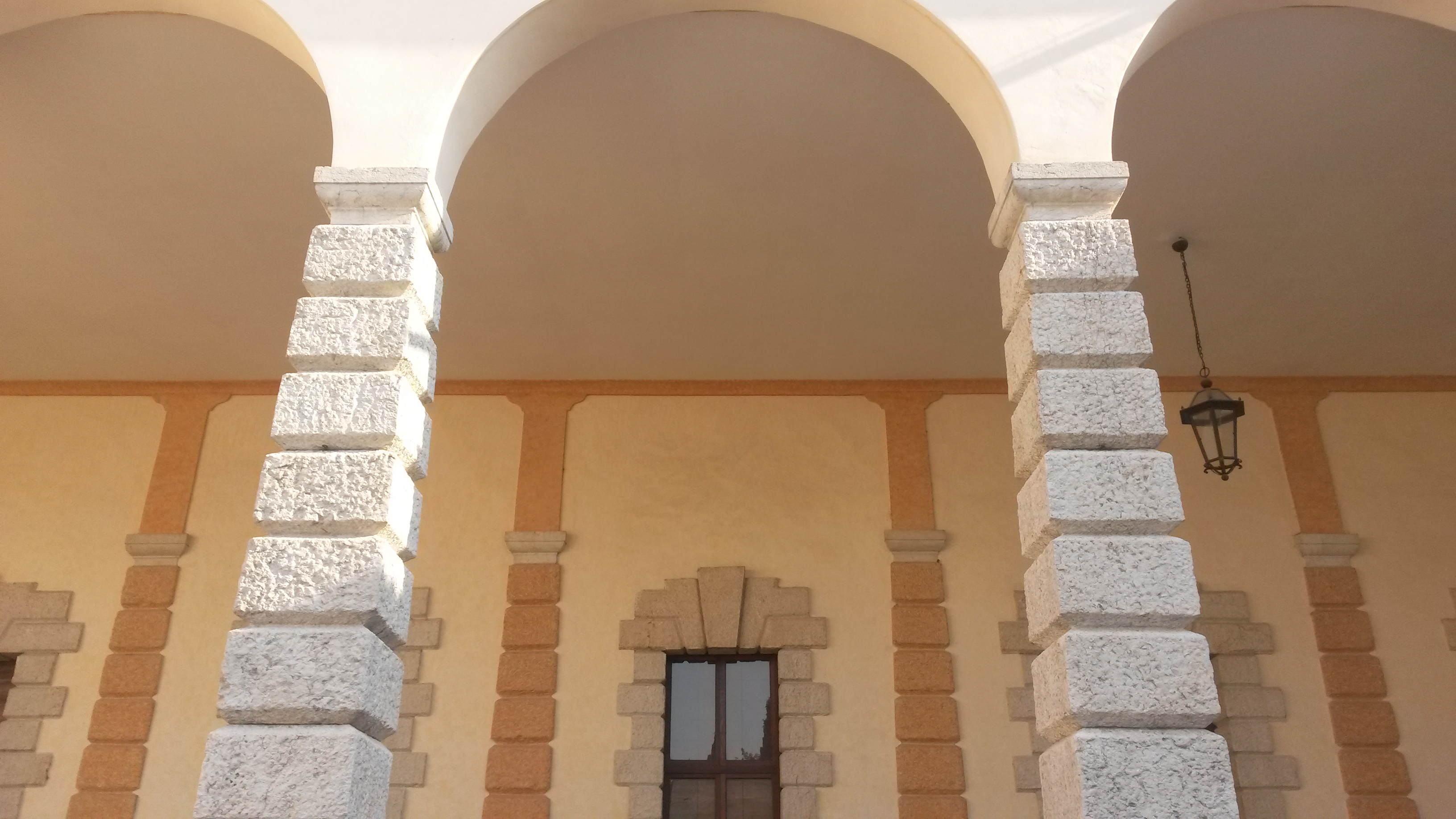 Loggia nello stile del Sanmicheli, 1580 circa. Il soffitto, crollato negli anni 1944 e seguenti, è stato restaurato nel 2014.